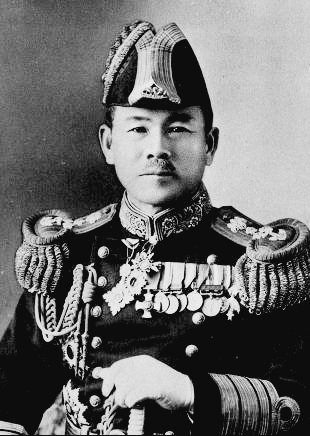 Teijirō Toyoda / 豊田貞次郎